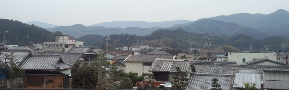 生石高原は正面最奥の山である。